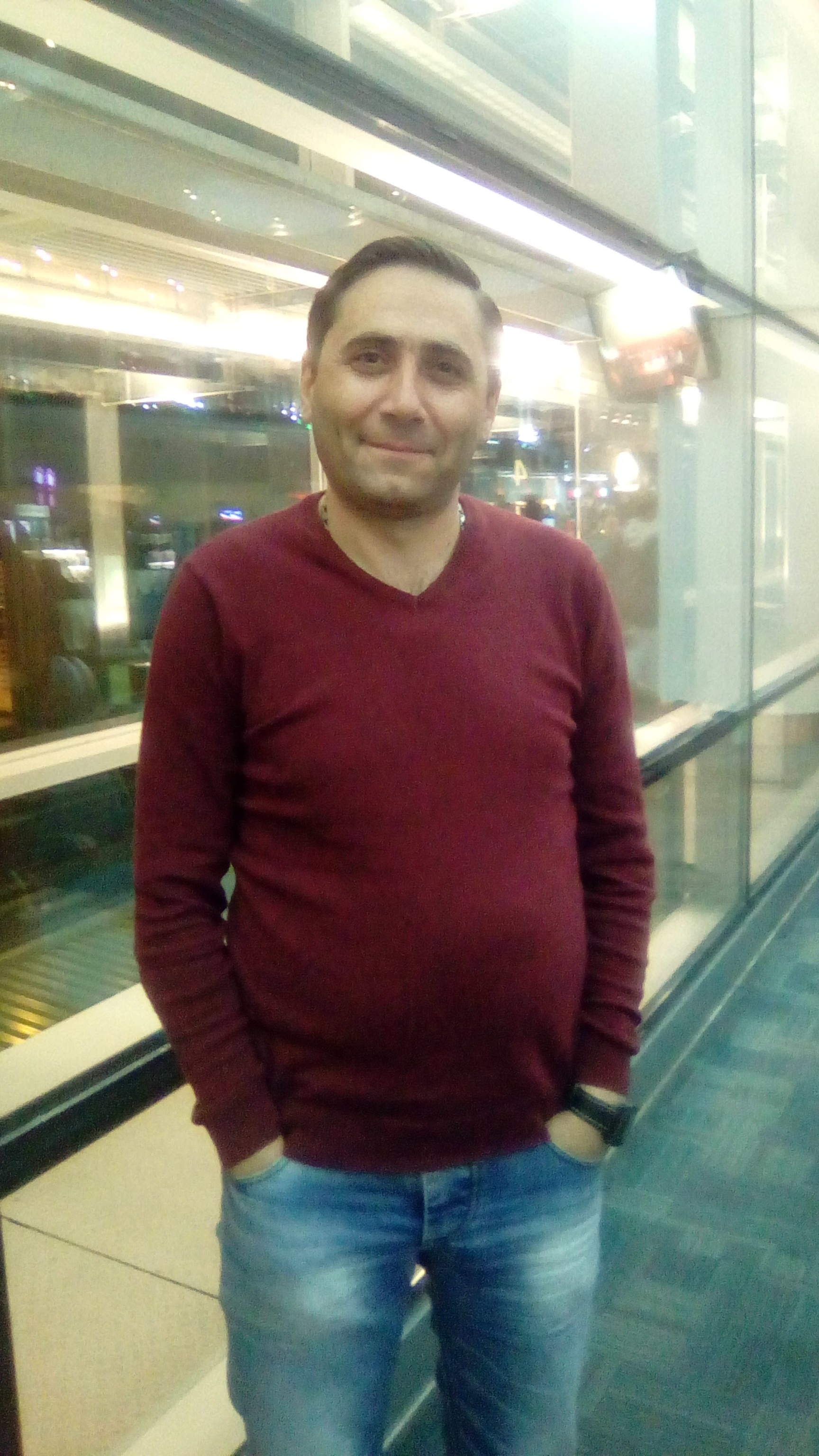 Արմեն Աբովյանը 2017 թվականին Զվարթնոց օդանավակայանում